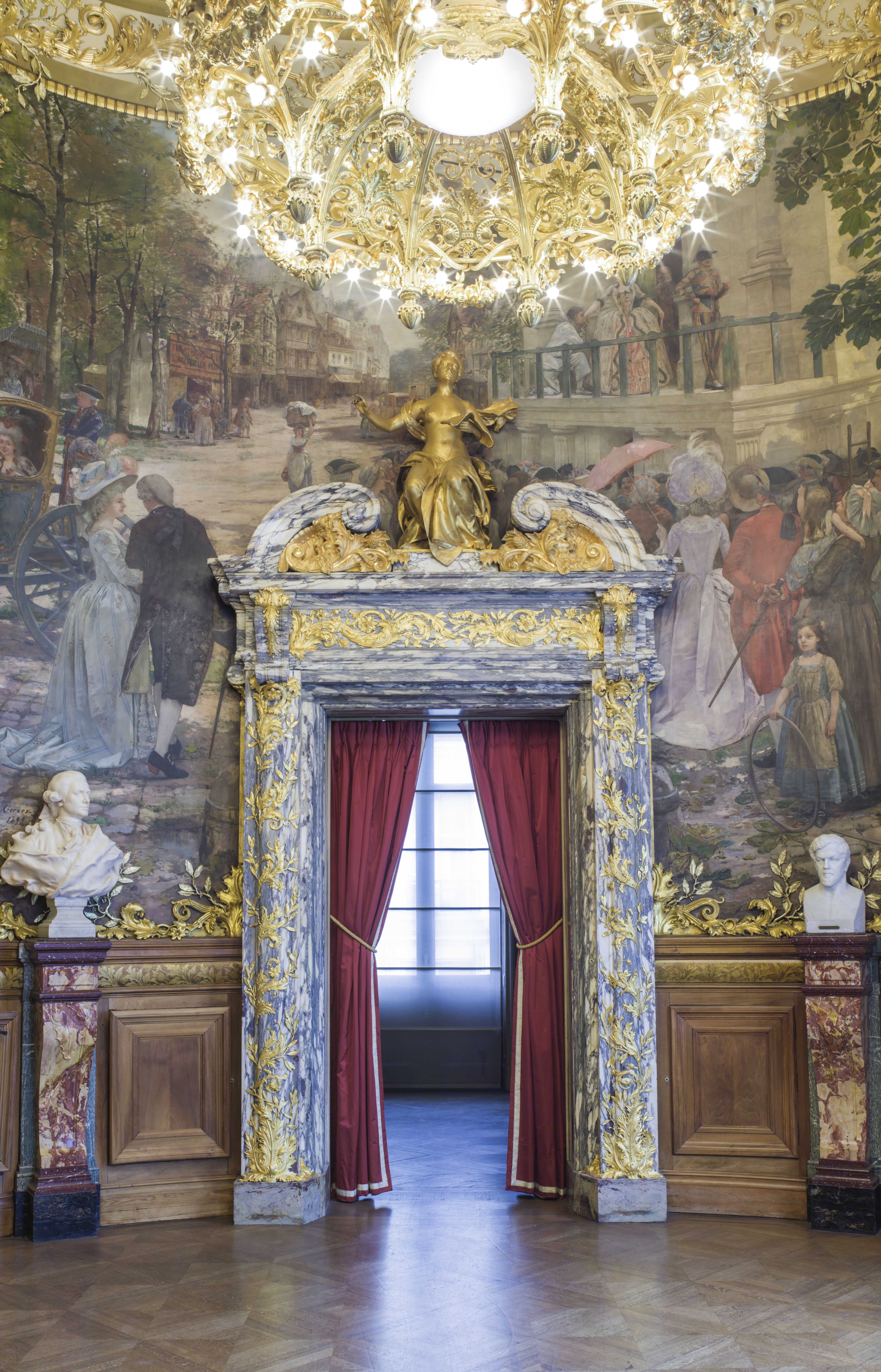 Scène de la foire Saint Laurent - Fresque de Henry Gervex - Foyer de l'Opéra Comique